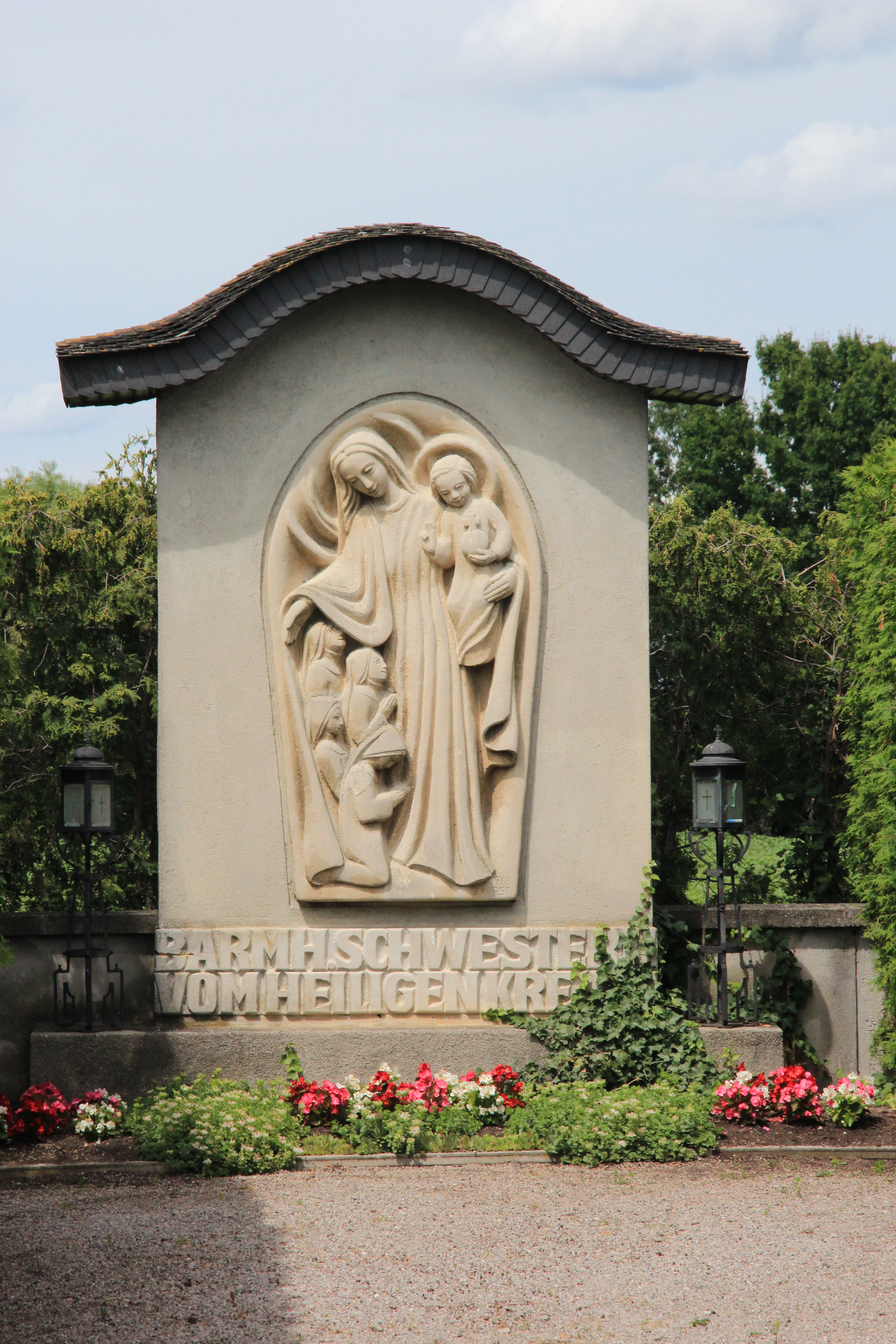 Grab auf dem Laxenburger Friedhof